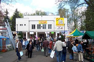 Výstaviště Louny, Hlavní pavilon A.